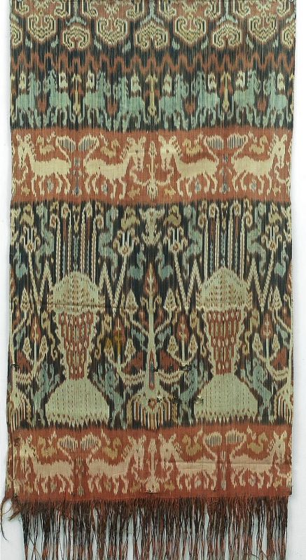 Doek. Edelmannen in Oost Sumba dragen twee identieke hinggi doeken. Eén om de schouders, de ander rond de heupen. Het weven en dragen van deze kleurrijke doeken (voornamelijk rood, blauw en bruin) was oorspronkelijk het alleenrecht van de adel. De doeken vertonen een grote verscheidenheid aan motieven waaronder mensen, schedelbomen, dieren zoals paarden, vogels en zeedieren. De doeken vervullen verschillende functies in de maatschappij van Sumba. Als erfstukken van de familie, spelen ze een belangrijke rol in de rituele uitwisseling van geschenken en allerbelangrijkst bij begravenisriten. Overleden leiders worden in een groot aantal (tot 200 aan toe) Hinggidoeken gelegd om de passage van de ziel naar wereld van de voorouders te vergemakkelijken.. Ceremoniële schouder- en/of heupdoek voor mannen Unknown language: Hinggi kombu